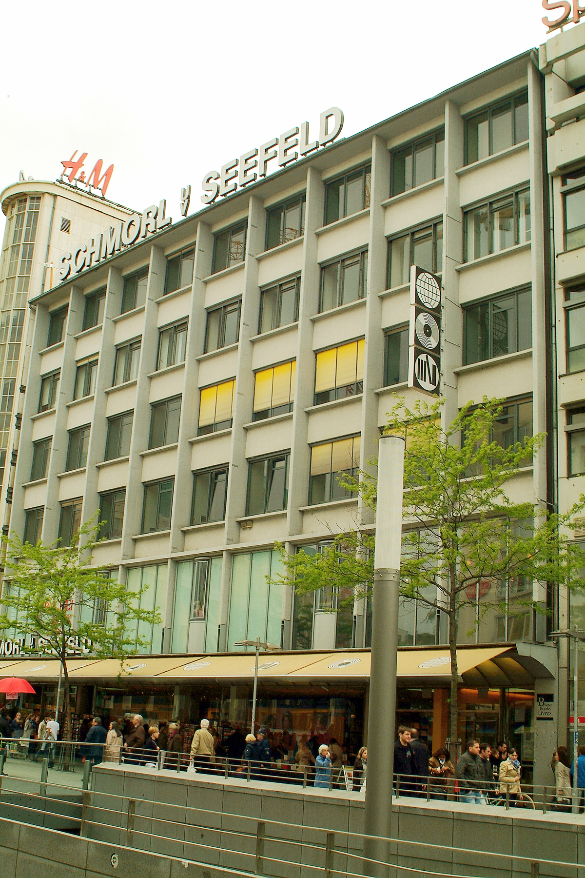 Die Buch- und Medienhandlung Schmorl und von Seefeld, Ansicht von der Bahnhofstraße über die Niki-de-Saint-Phalle-Promenade